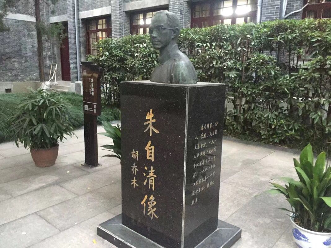 朱自清像，胡乔木题词